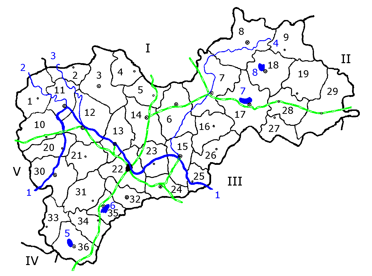 Ярославская область в 1940 году. Схема. Указаны границы и центры районов, железные дороги и основные водные объекты. Первоисточники: Ярославская область в годы Великой Отечественной войны. Научно-популярное справочное издание / Управление по делам архивов Правительства Ярославской области, Государственный архив Ярославской области; сост. Г. Казаринова, О. Кузнецова. — Ярославль: Индиго, 2010. — 400 с. — 1000 экз. — ISBN 978-5-91722-028-4. Рязанцев Н. П., Салова Ю. Г. История Ярославского края (1930—2005 гг.): учебное пособие для учащихся средних общеобразовательных учебных заведений. — Ярославль, Рыбинск: Б/и, Рыбинский дом печати, 2005. — 277 с. — ISBN 5-88697-134-3.